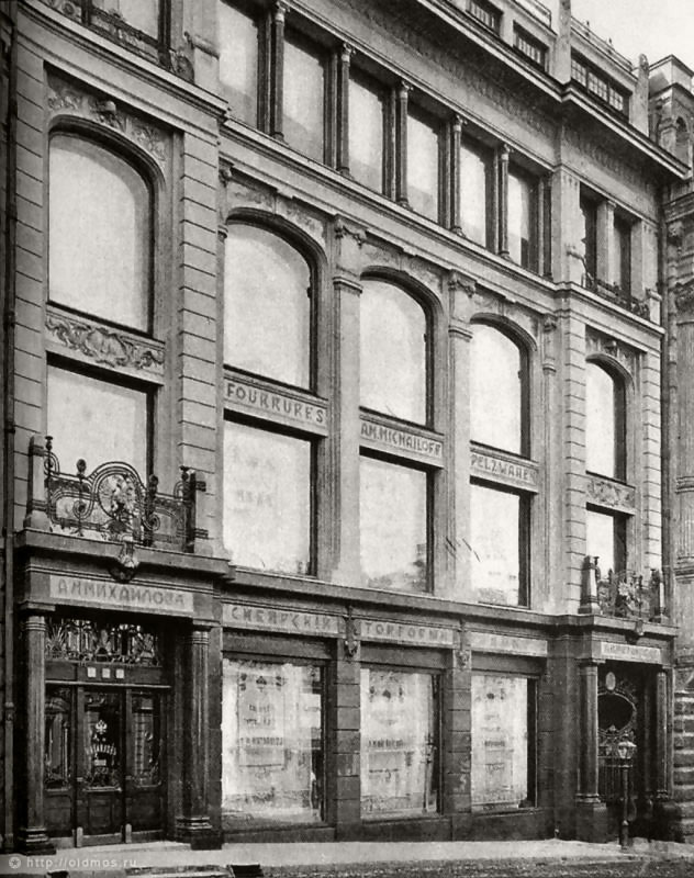 Пассаж Михайлова на Кузнецком Мосту в Москве